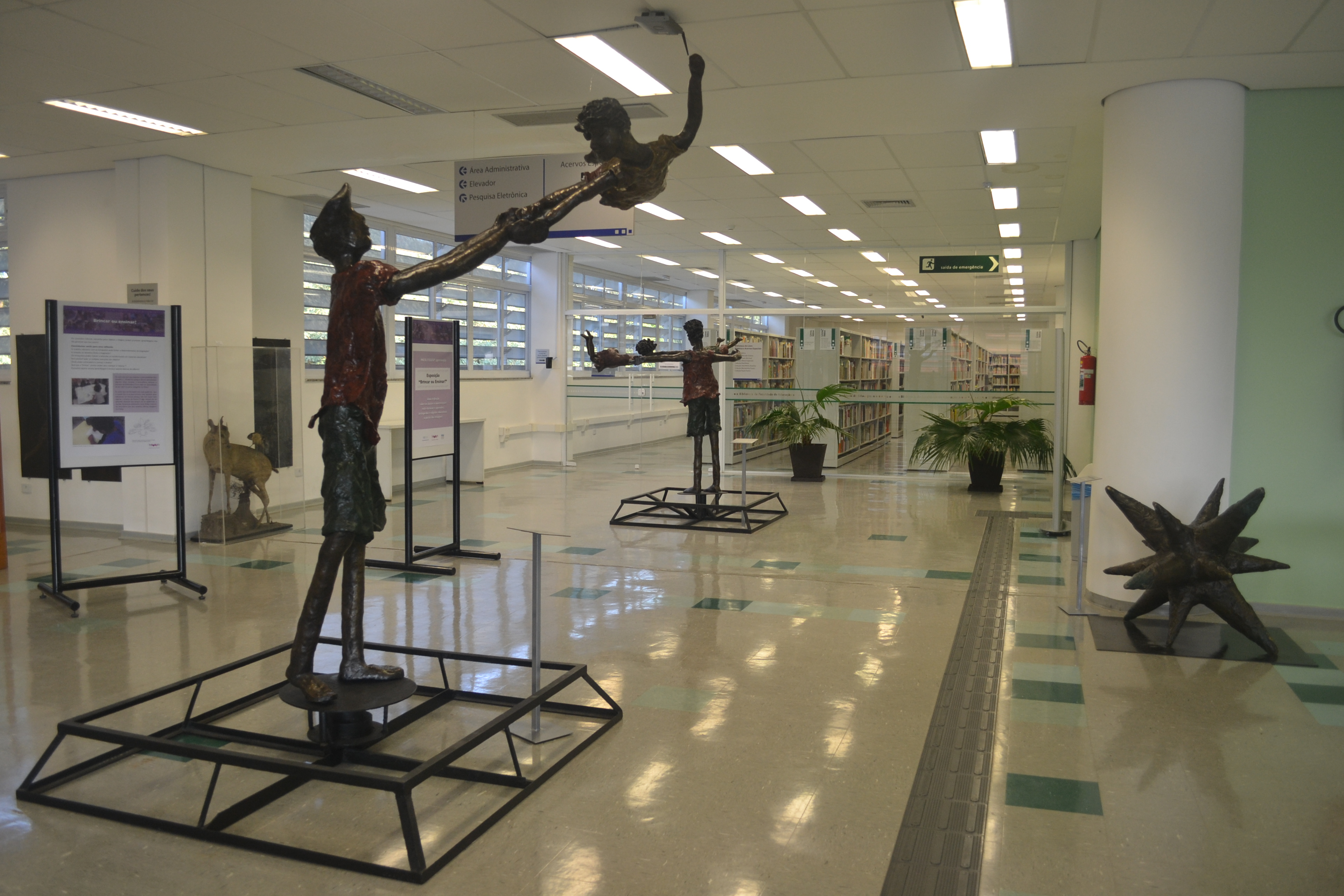 Exposição "Memórias de uma infância - cenas infantis" de Sandra Guinle do Museu da Educação e do Brinquedo no prédio Faculdade de Educação da USP.